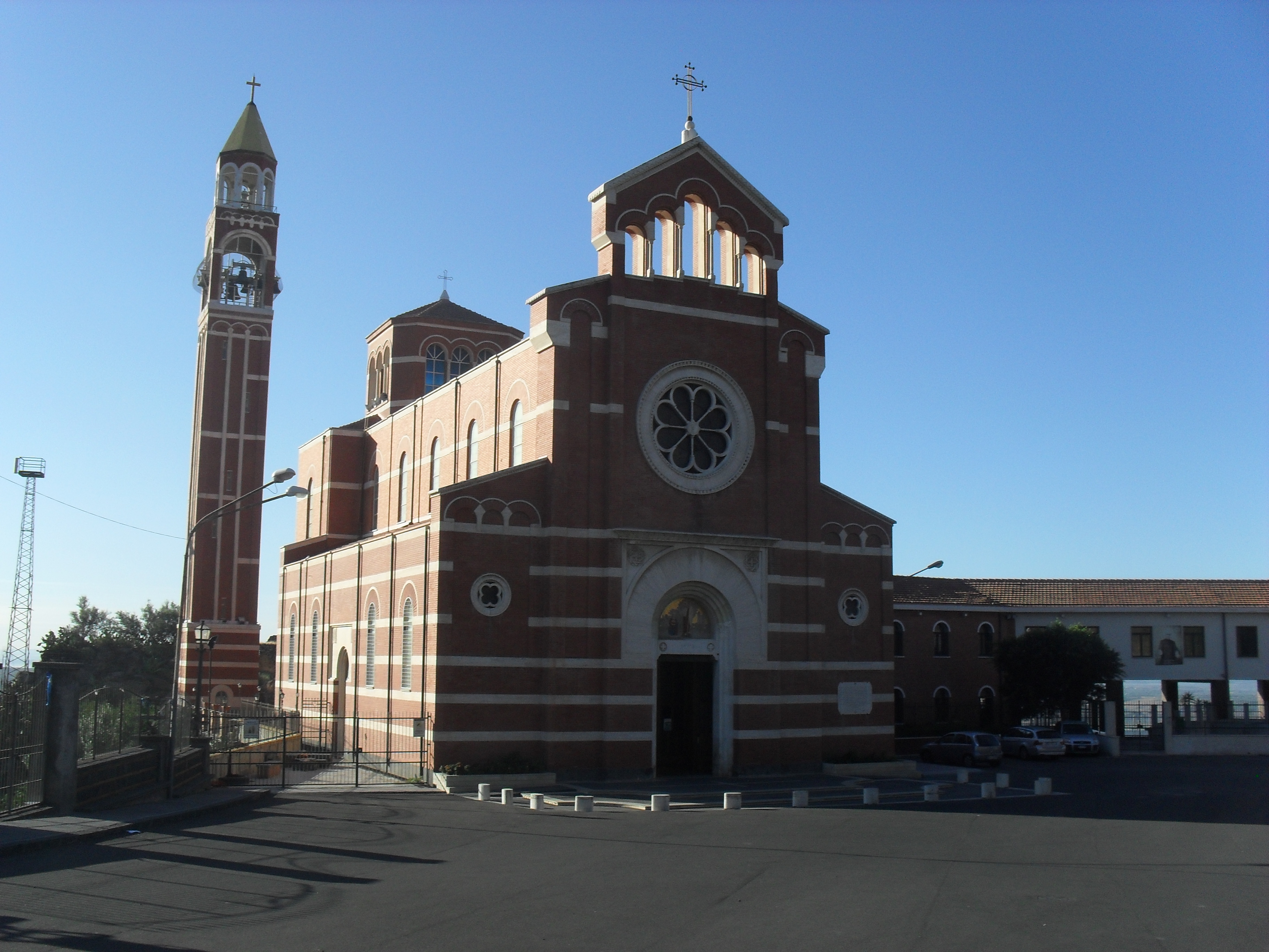 Veduta dal lato sinistro del Santuario della Consolazione di Paternò (CT)